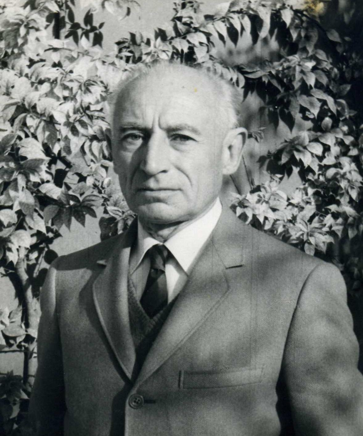 Tullio Pinelli negli anni della maturità